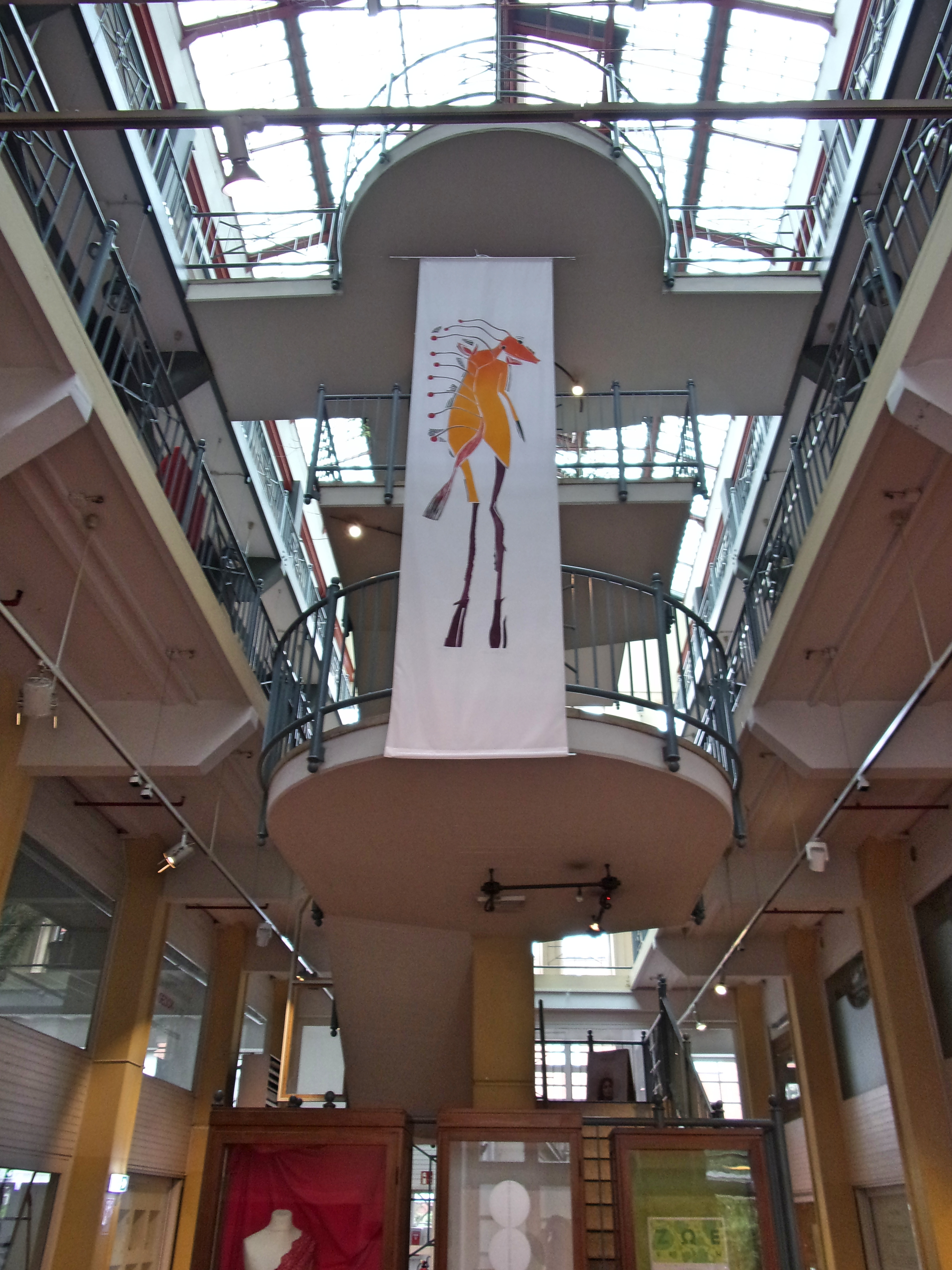 Koppel 66 Haus für Kunst & Handwerk in Hamburg-St. Georg, Innenansicht. This is a photograph of an architectural monument.